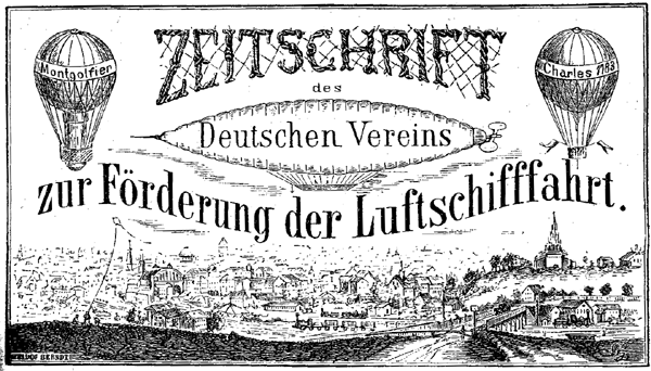 Zeitschriftentitel: Zeitschrift des Deutschen Vereins zur Förderung der Luftschifffahrt